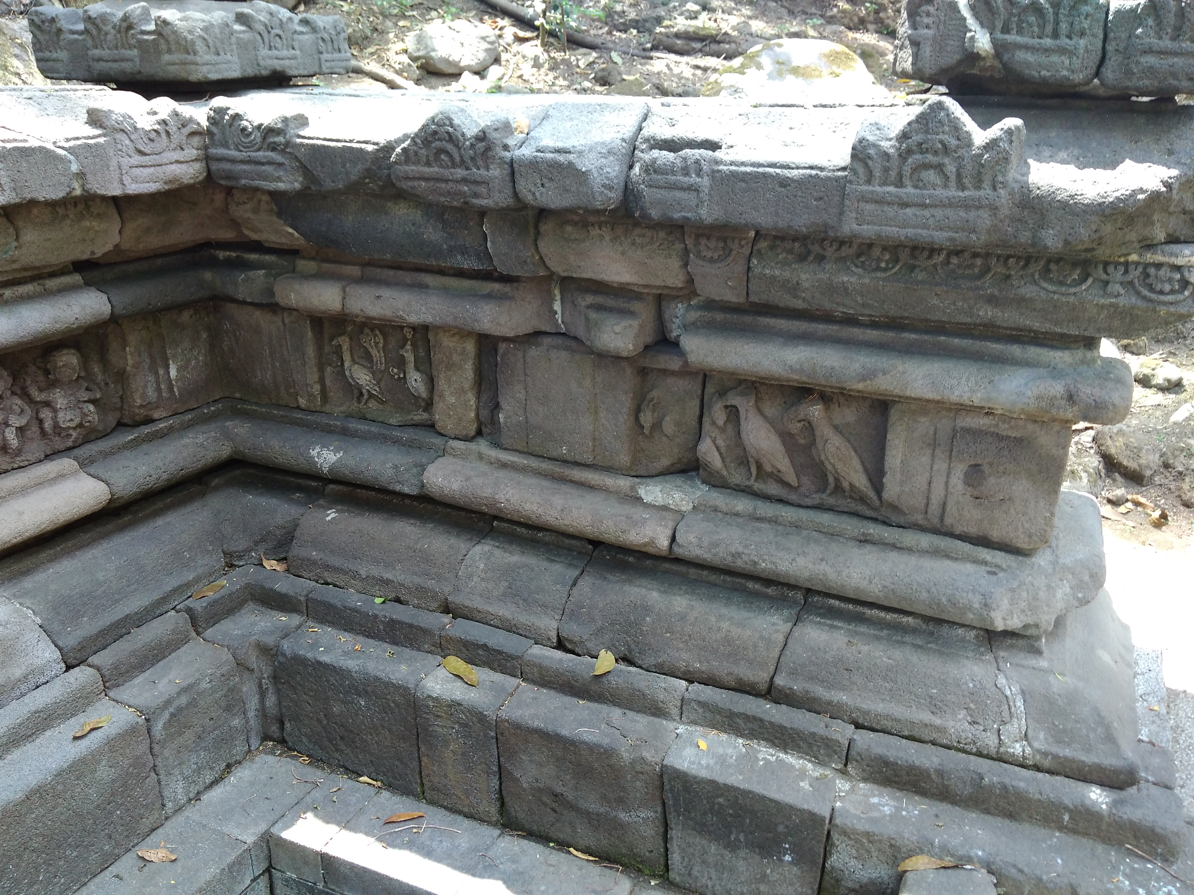 Relief burung di Situs Petirtaan Cabean Kunti